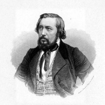 Portrait von Carl Wilhelm